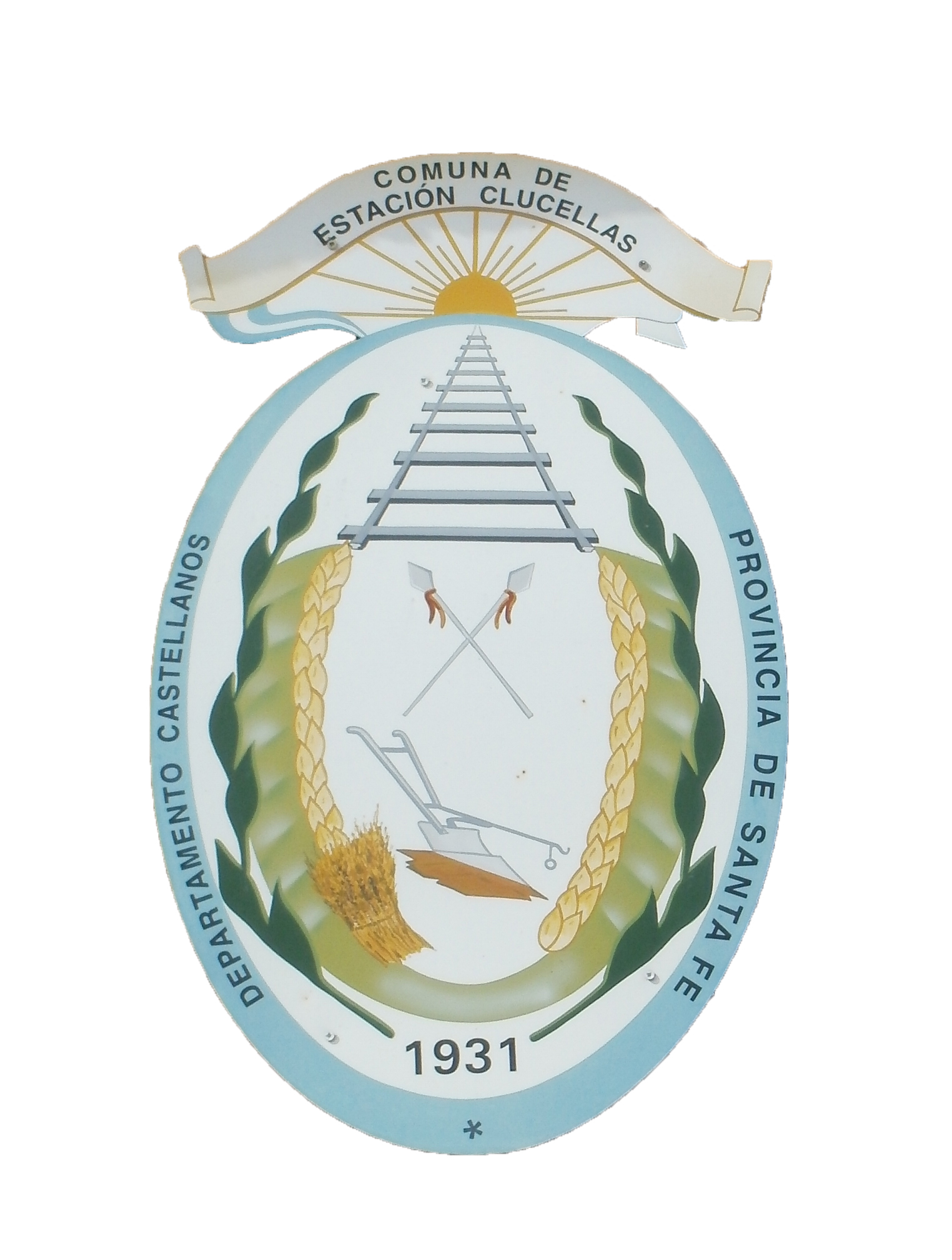 Escudo comunal de estacion clucellas